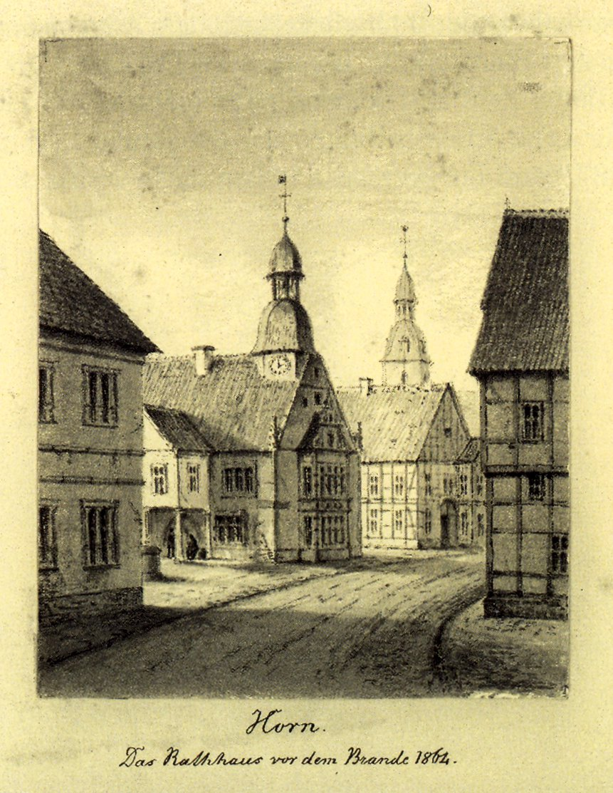 see: file:Emil Zeiß Marktplatz in Horn 1863.png